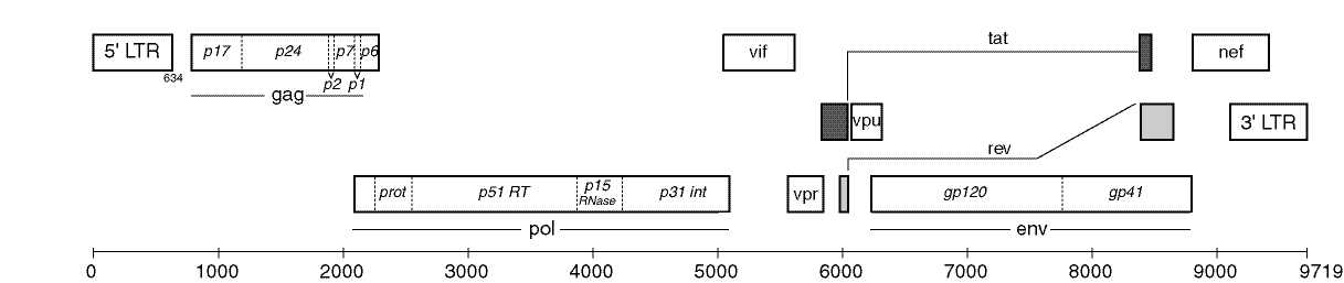 hiv-1 genome